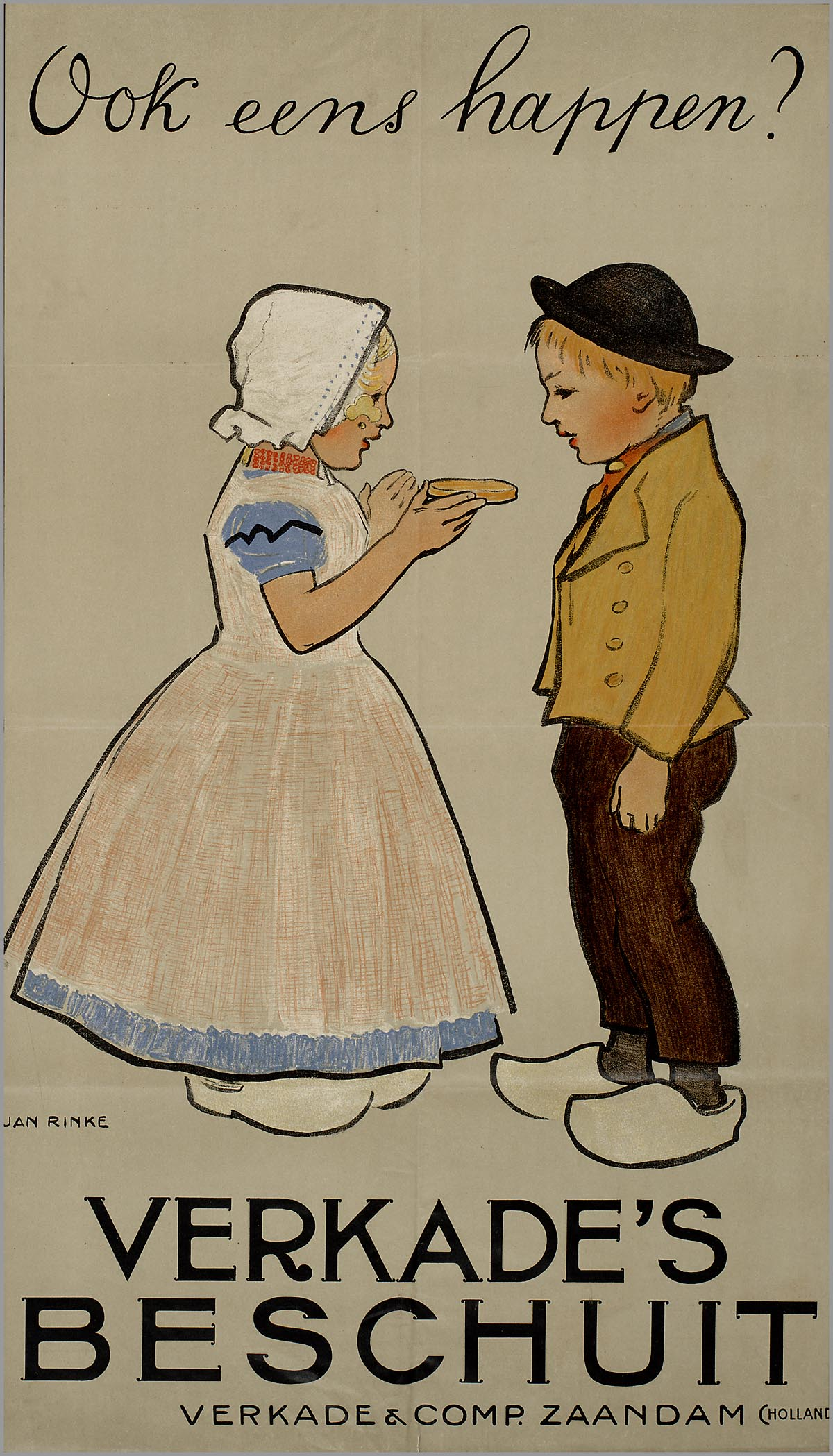 Affiche: Verkade's beschuit. Verkade & Comp. Zaandam (Holland).